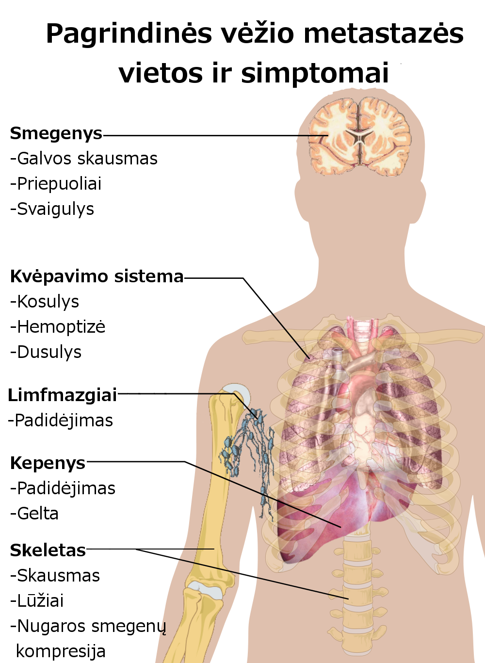 Metastazių vietos ir simptomai